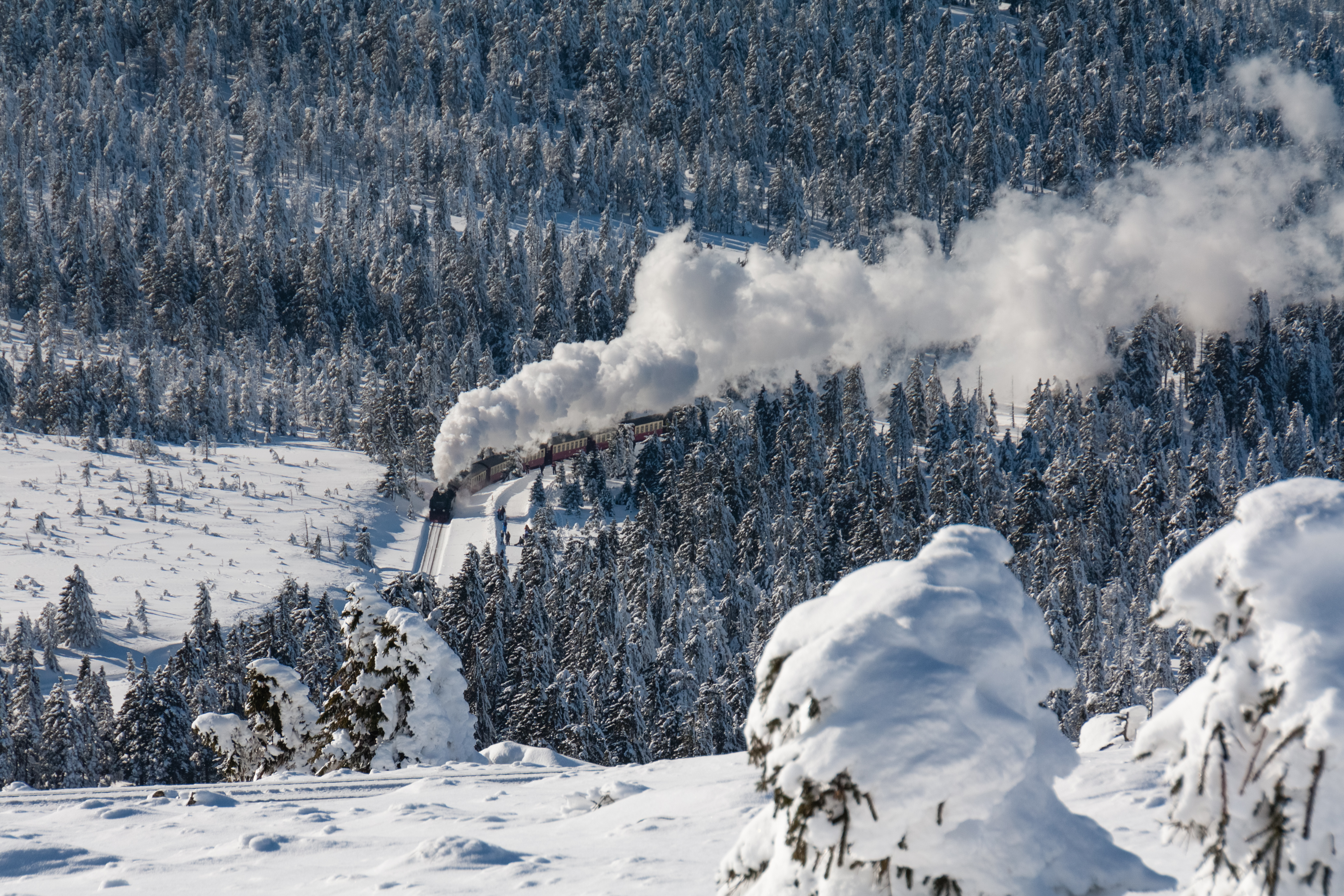 Dampfzug zum Brocken im Winter